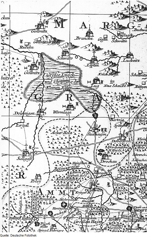 Original image description from the Deutsche Fotothek Senftenberg. Karte des Amtes Senftenberg, von Schenk, 1757 (Sign.: VII 105)